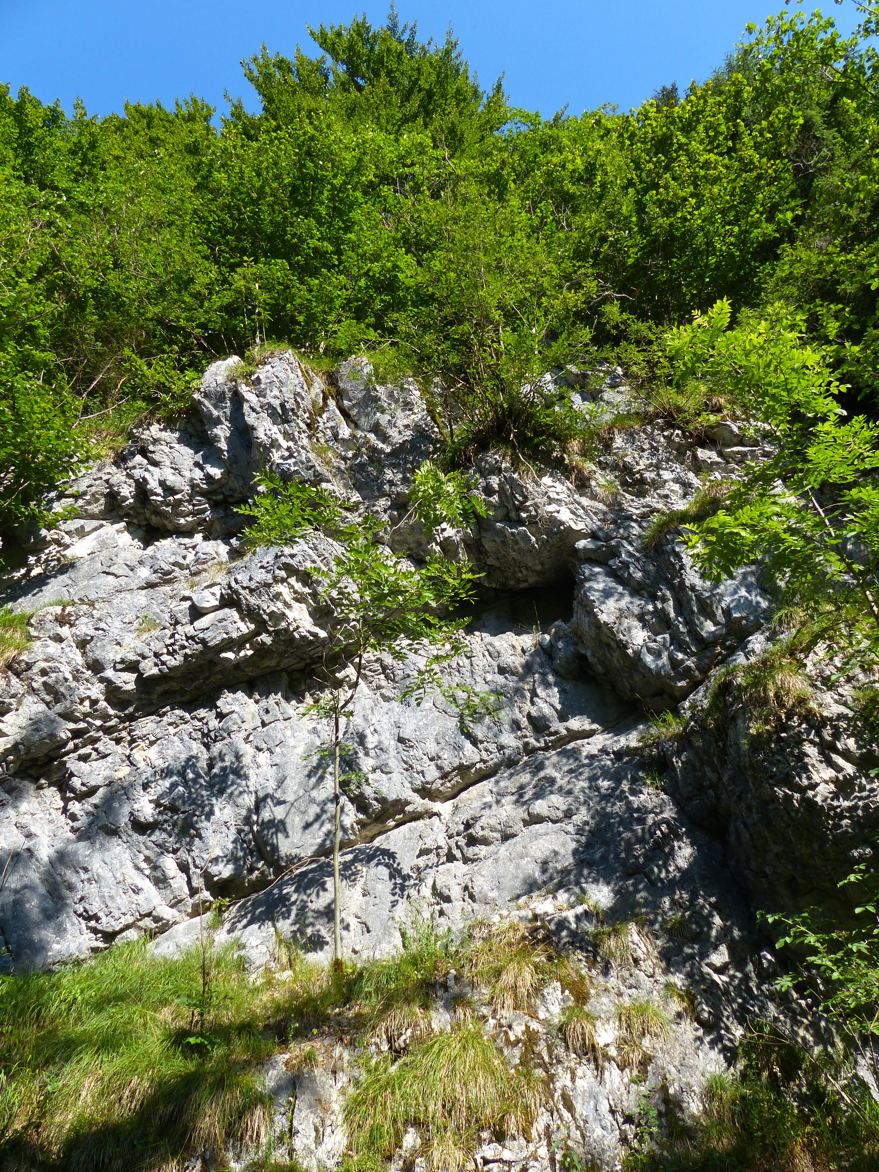 WikiProjekt Landstreicher Aufschluss an der Lochbachstrasse: Schrattenkalk